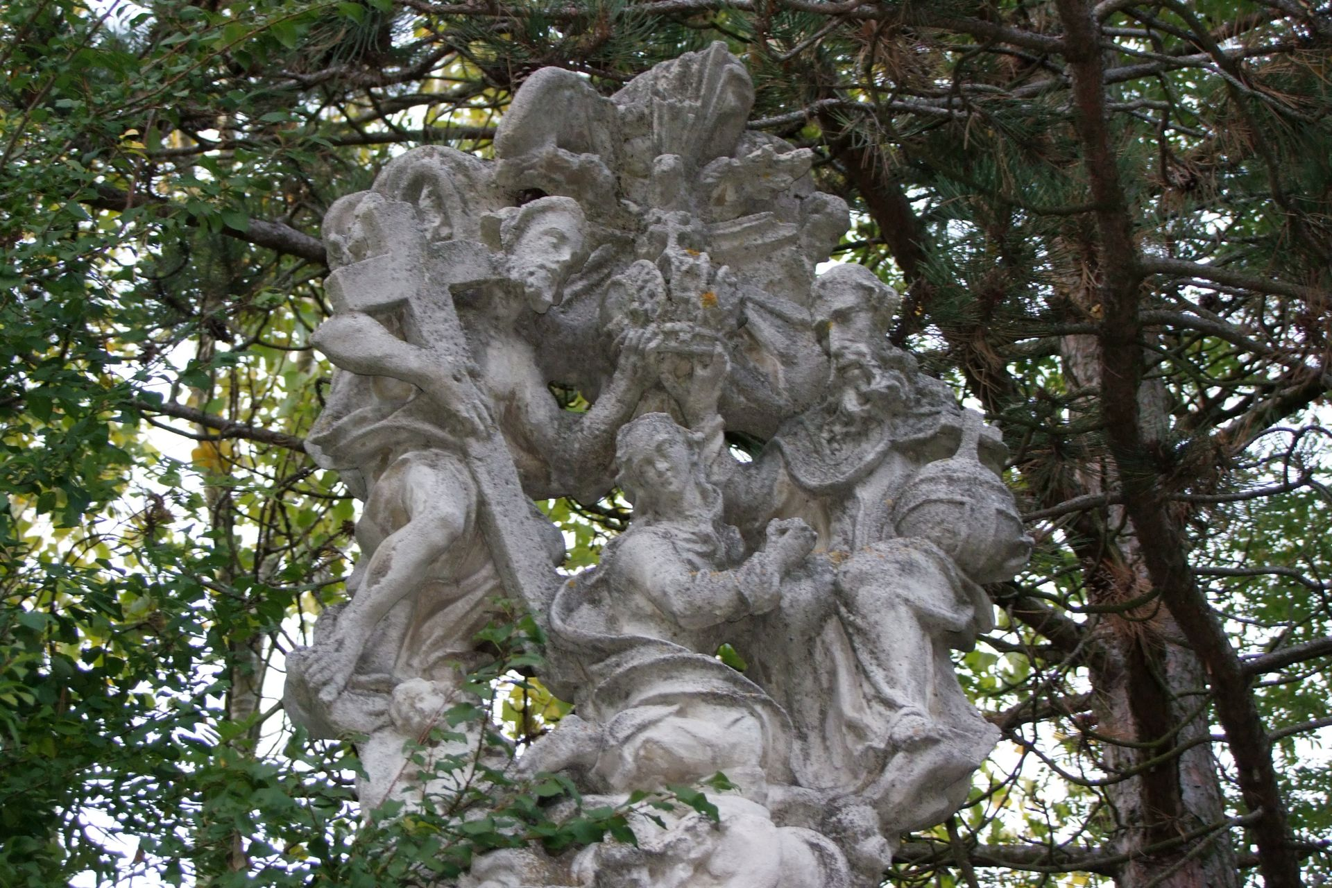 Mariensäule, Krönung Marias